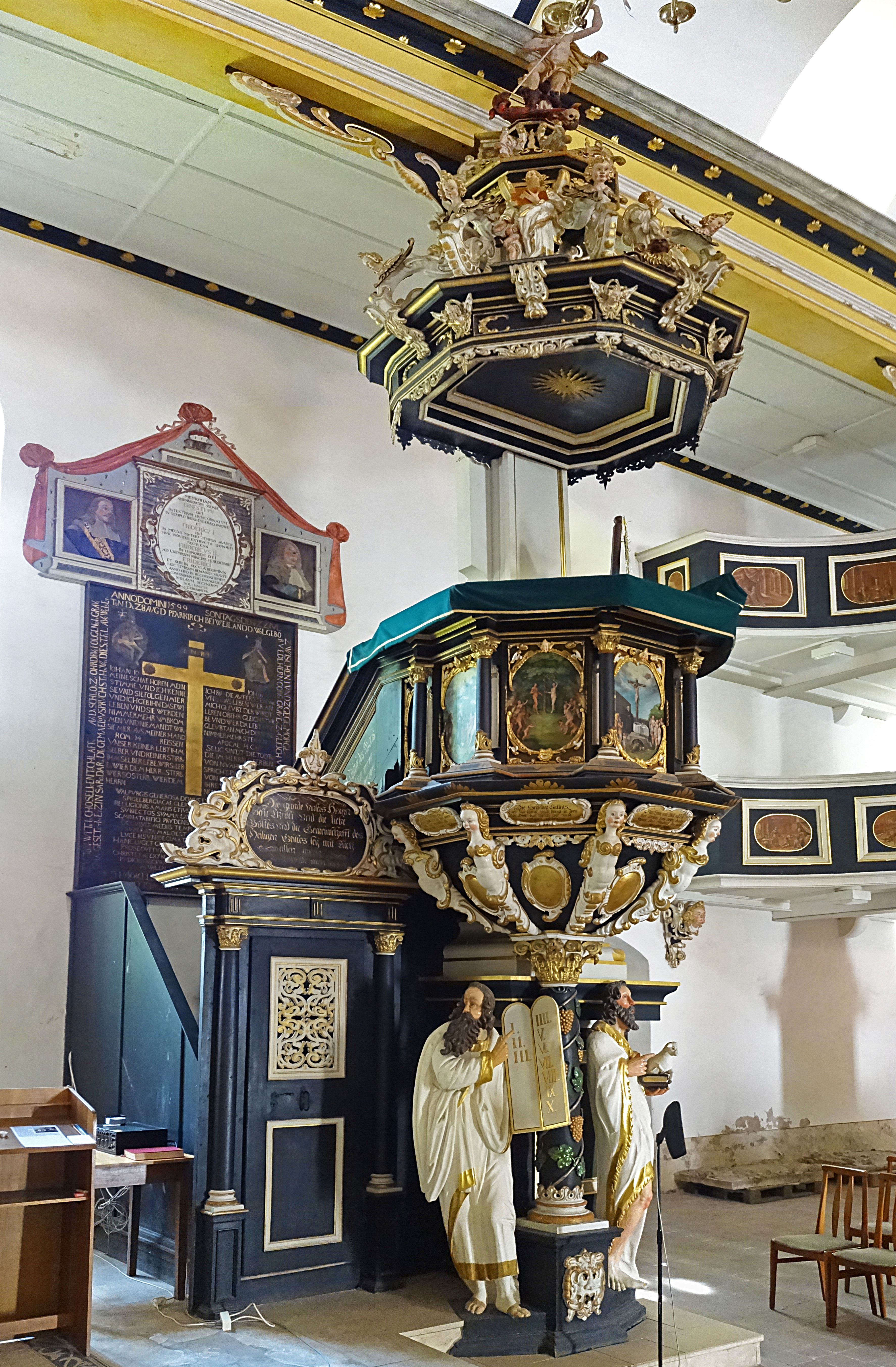 die Kanzel der Pfarrkirche St. Peter und Paul (Gräfentonna) stammt aus der Gothaer Schlosskirche